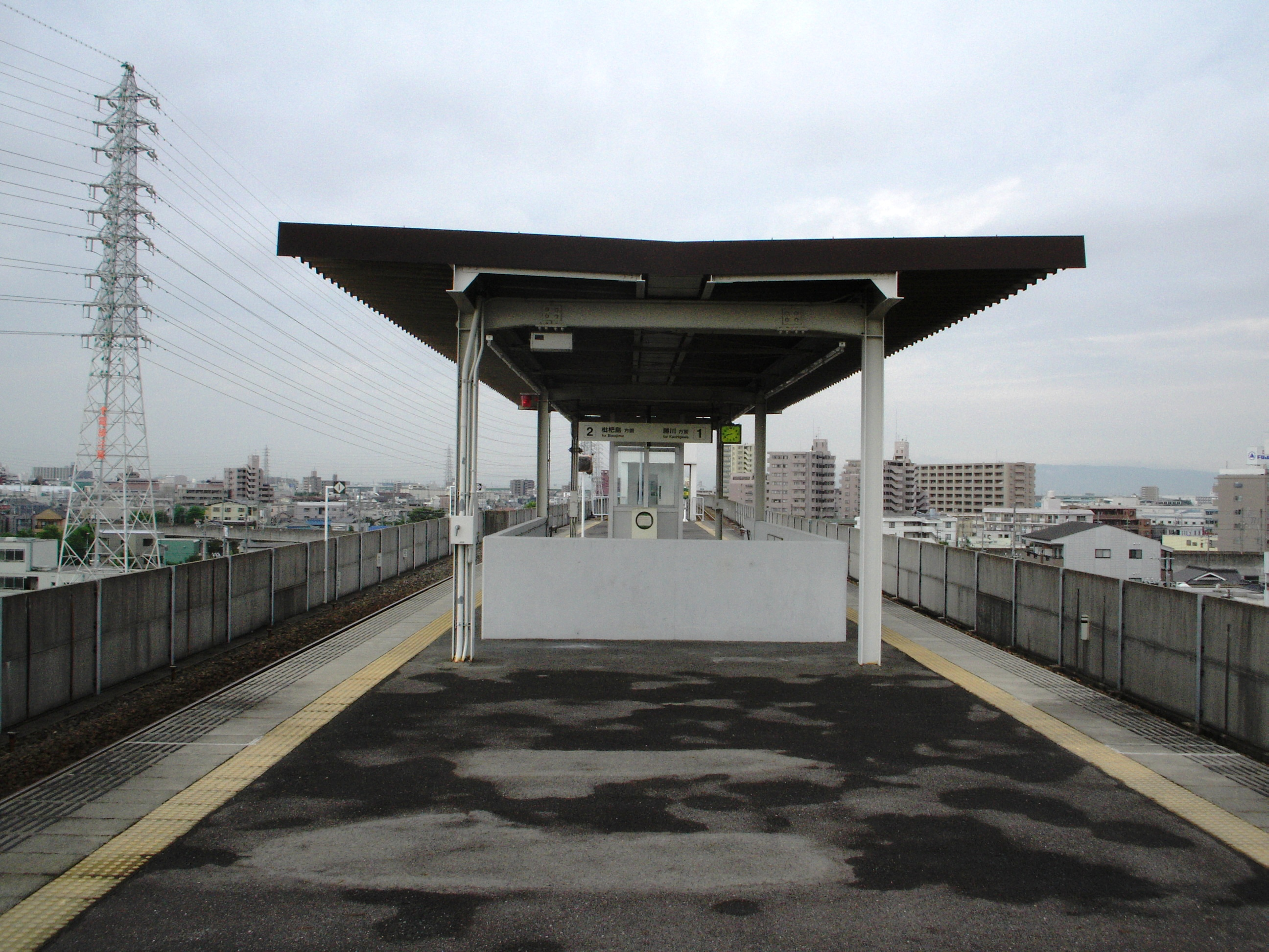 東海交通事業城北線小田井駅プラットホーム